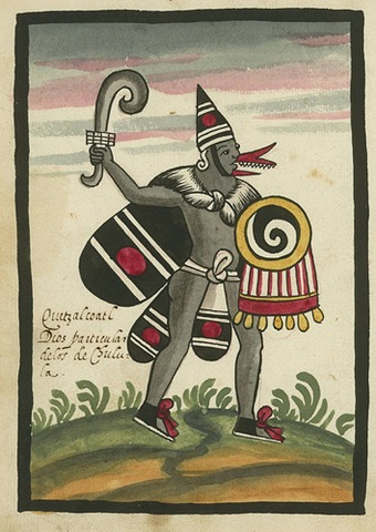 es una imagen encontrado en la leyenda de copil donde arrancaron el corazón